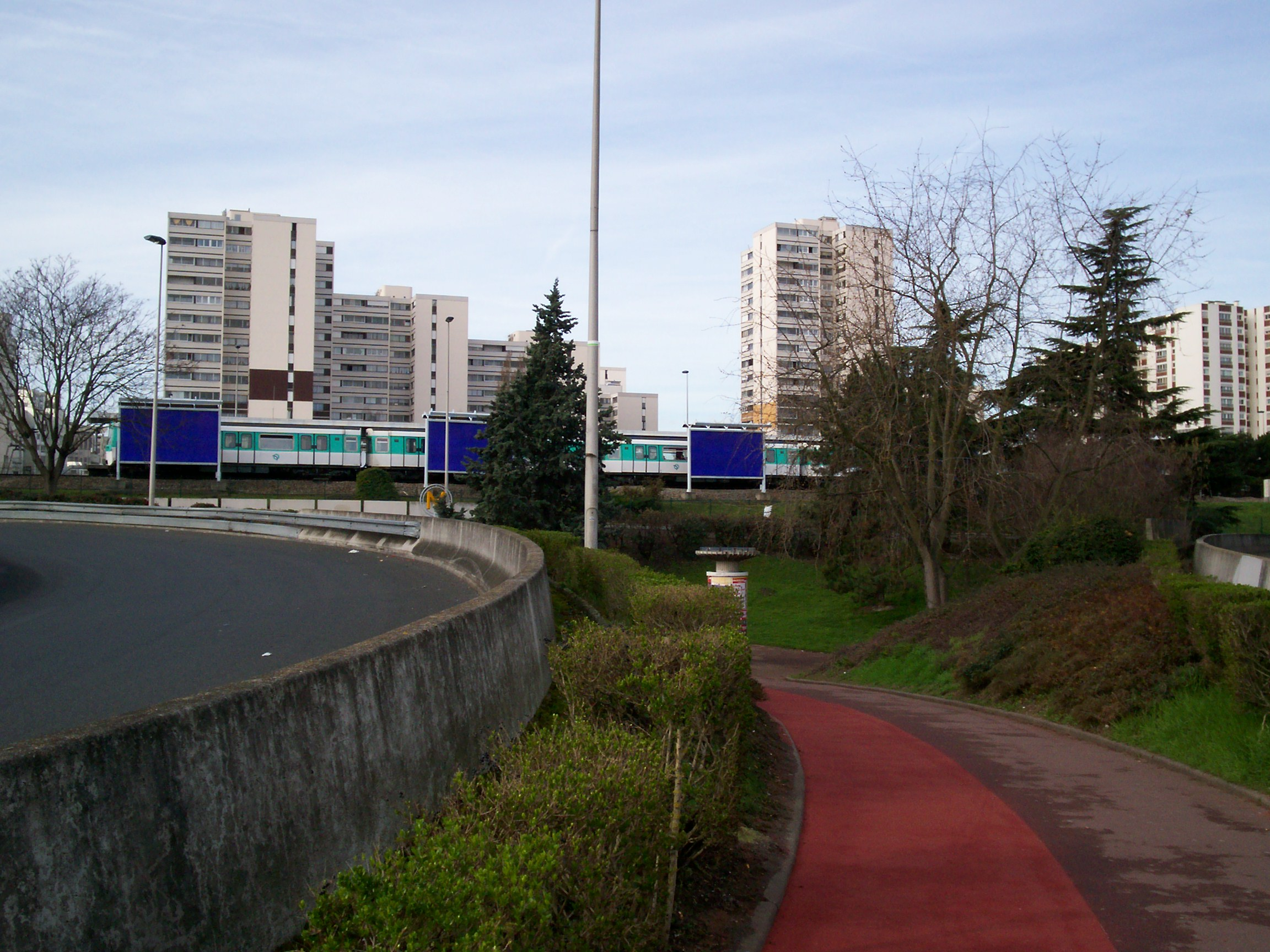 Vue de la station métropolitaine Créteil Université depuis les quais du TVM